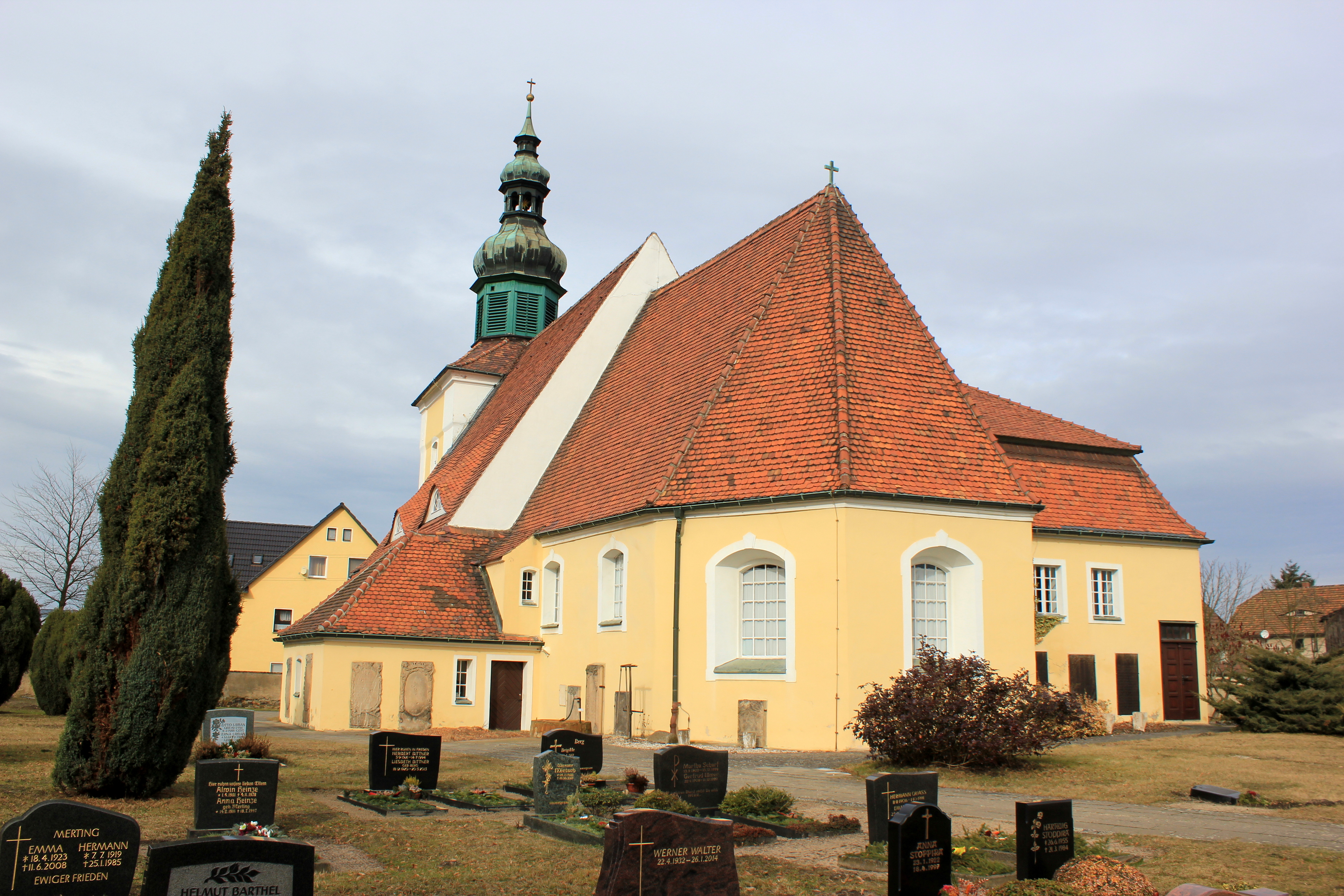 Hornjoserbsce: Ewangelska cyrkej w Klětnom.